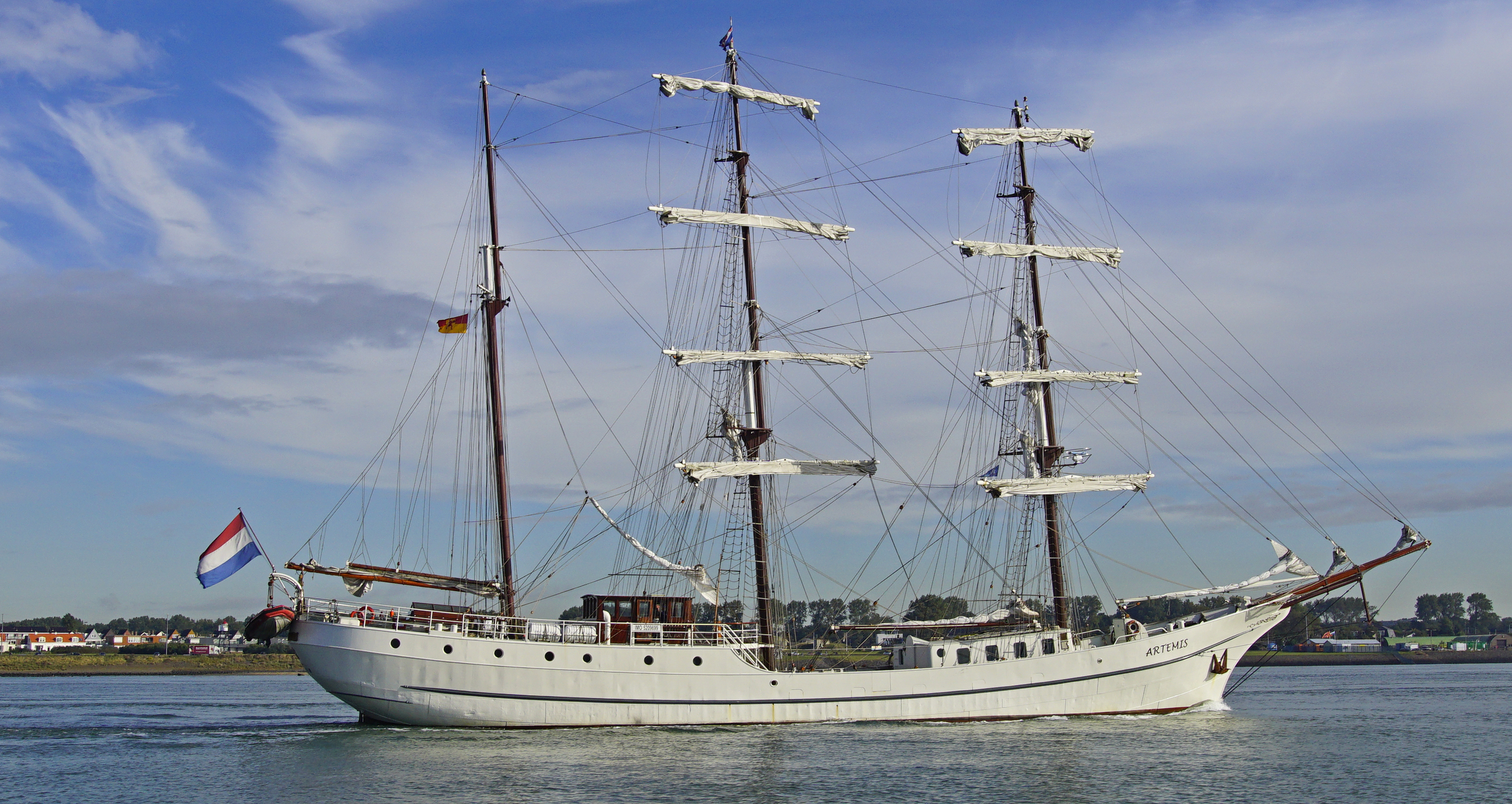 Nieuwe Waterweg 10-10-2016 . Gezien vanaf RET Fastferry DE NIEUWE PRINS. De driemastbark Artemis is een prachtig staaltje zeevaarttraditie Het schip is in 1926 in Noorwegen gebouwd voor de walvisvaart Later is het ingezet als vrachtschip tussen Azië en Zuid-Amerika Sinds 2001 zeilt de Artemis weer op Nood-Europese wateren tot meerdere eer en glorie van de Nederlandse zeilvloot! Het Friese Tall Ship Company kocht eind vorige eeuw de Artemis en bouwde haar met veel liefde en gevoel voor detail terug naar een verbluffend fraai zeilschip